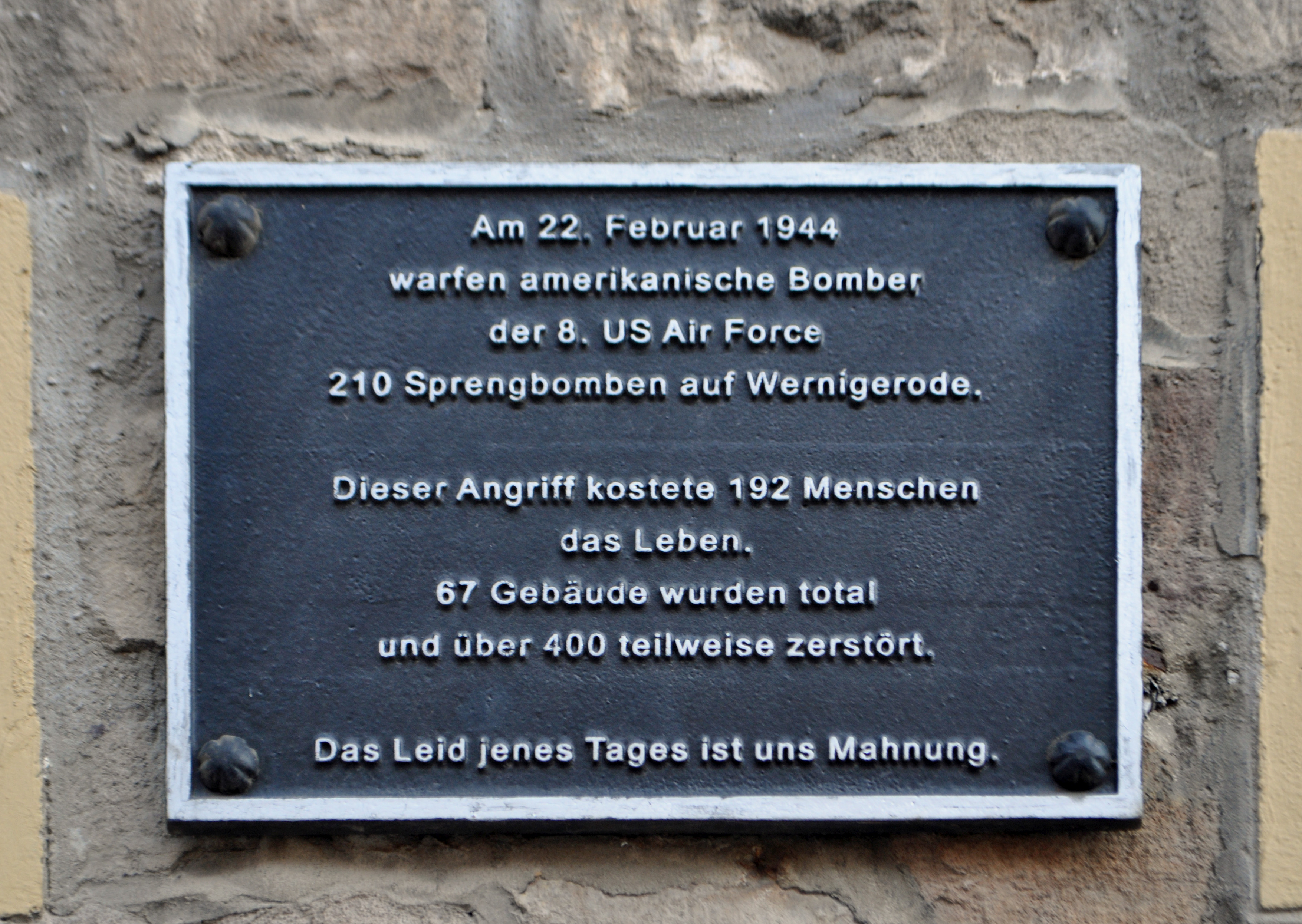 Gedenktafel in der Breiten Straße 78. Gedenken an den Luftangriff am 22. Februar 1944.